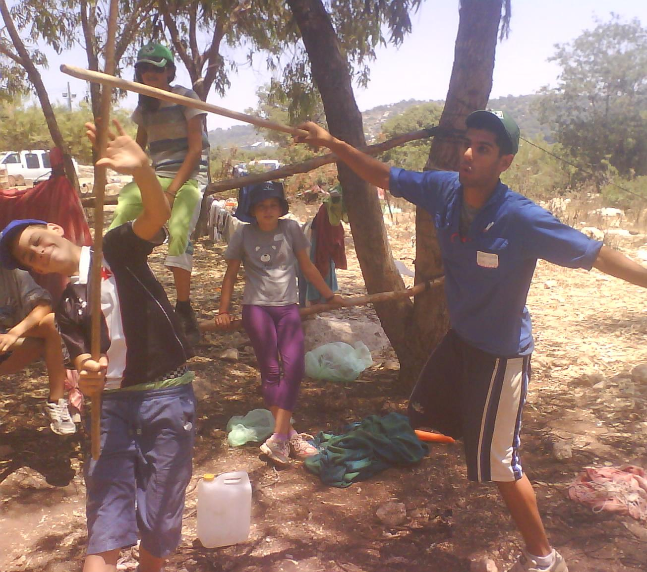 חניך ומדריך מתאמנים בקרב פנים אל פנים במחנה העפלה.